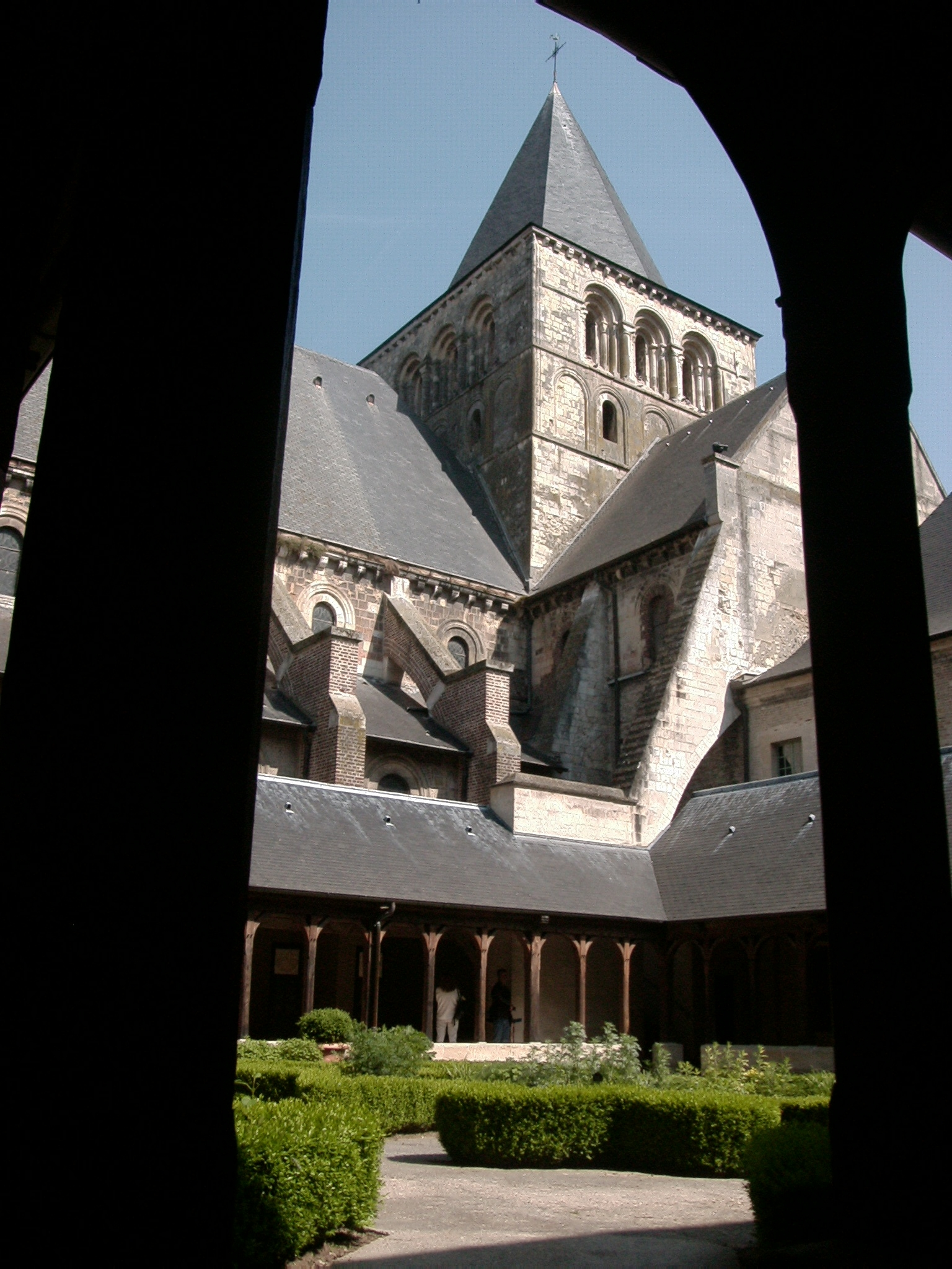 Abtei von Montivilliers, Kreuzgang Datum: 02.05.2011 Urheber: M. Pfeiffer alias Gordito1869 Quelle: privates Fotoarchiv des Urhebers